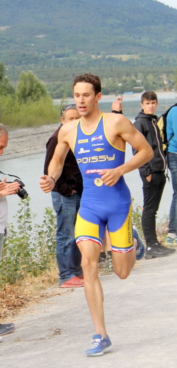 Dorian Coninx GP FFtri Embrun 2017